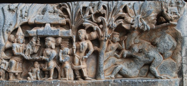 ಕನ್ನಡ: ಪಟ್ಟಿಕೆಗಳಲ್ಲಿ ಪುರಾಣ ಕತೆಗಳು(ಭಾಗವತ_ಪೂತನೀ ಸಂಹಾರ)